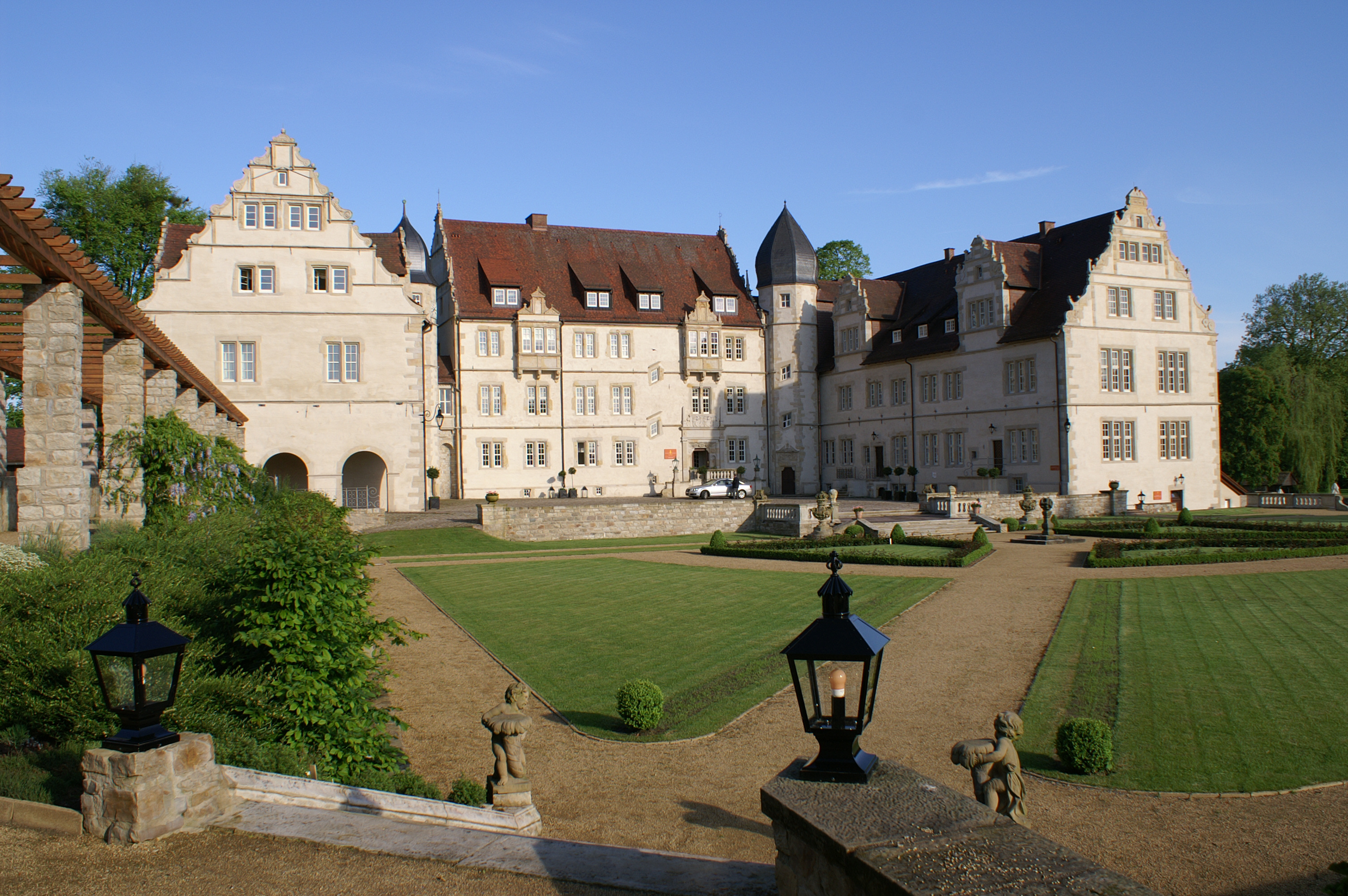 Bildgegenstand/-datum: Deutschland, Niedersachsen, Gartenansicht von Schloss Schwöbber bei Aerzen in der Nähe von Hameln, ein schönes Beispiel der Weserrenaissance, 25. Mai 2006